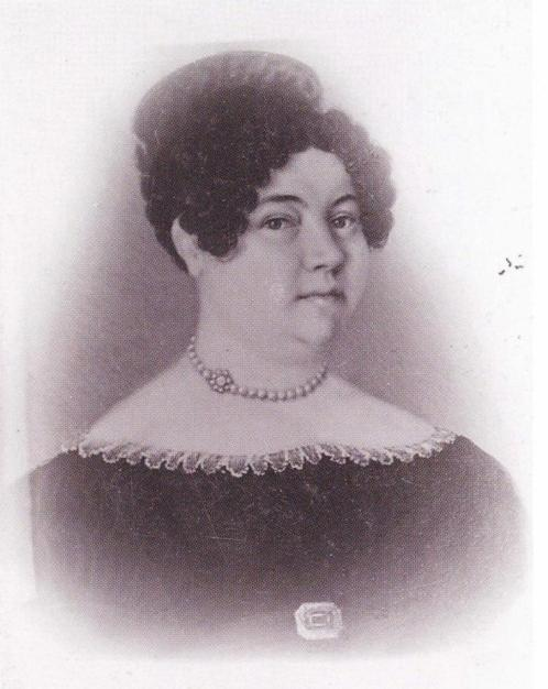 Kirjailija Augusta Lundahl (1811–1892).